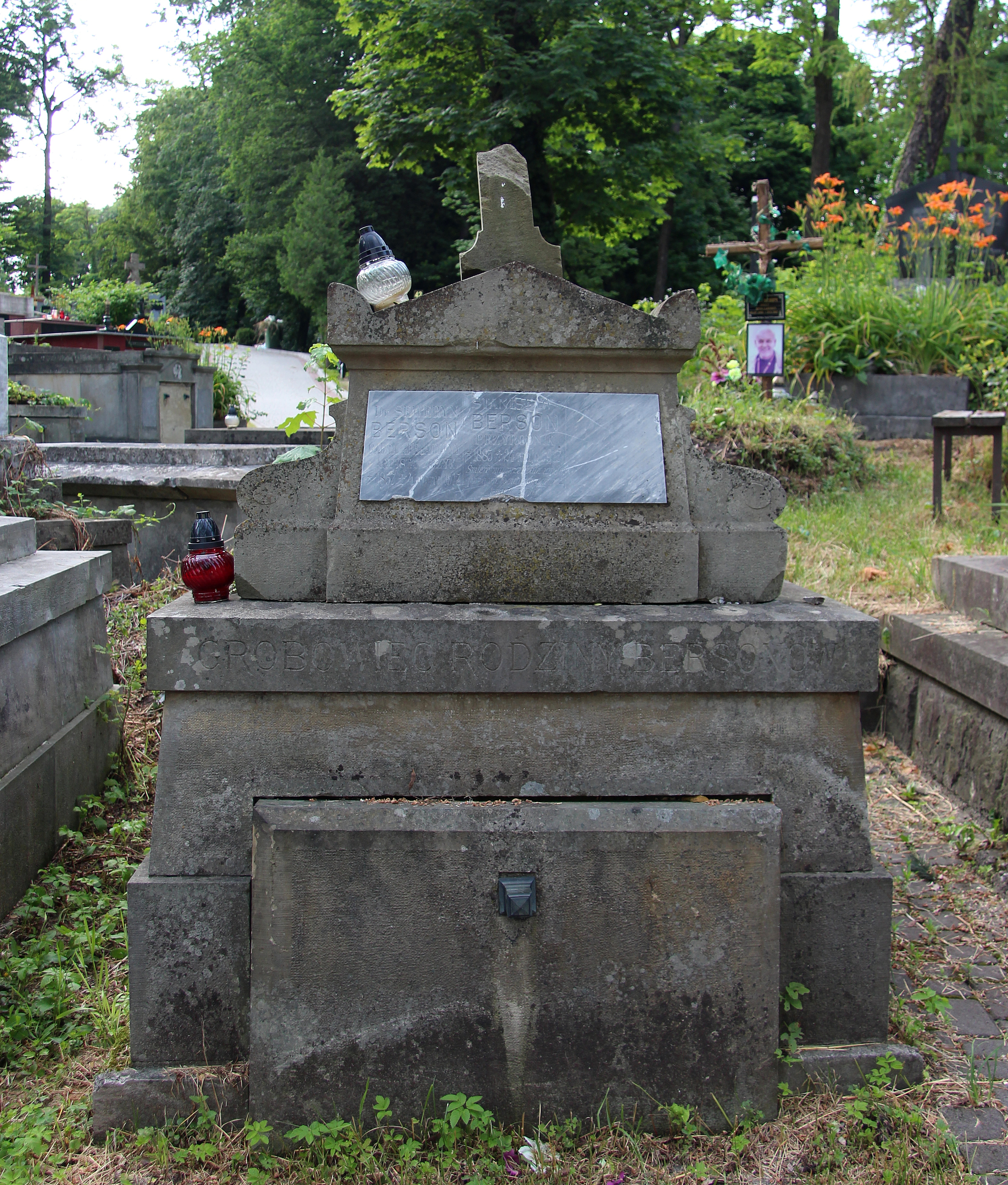 Гробівець родини Берсон.Личаківський цвинтар ,поле 44.